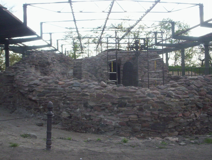 Palatium na Ostrowiu Lednickim